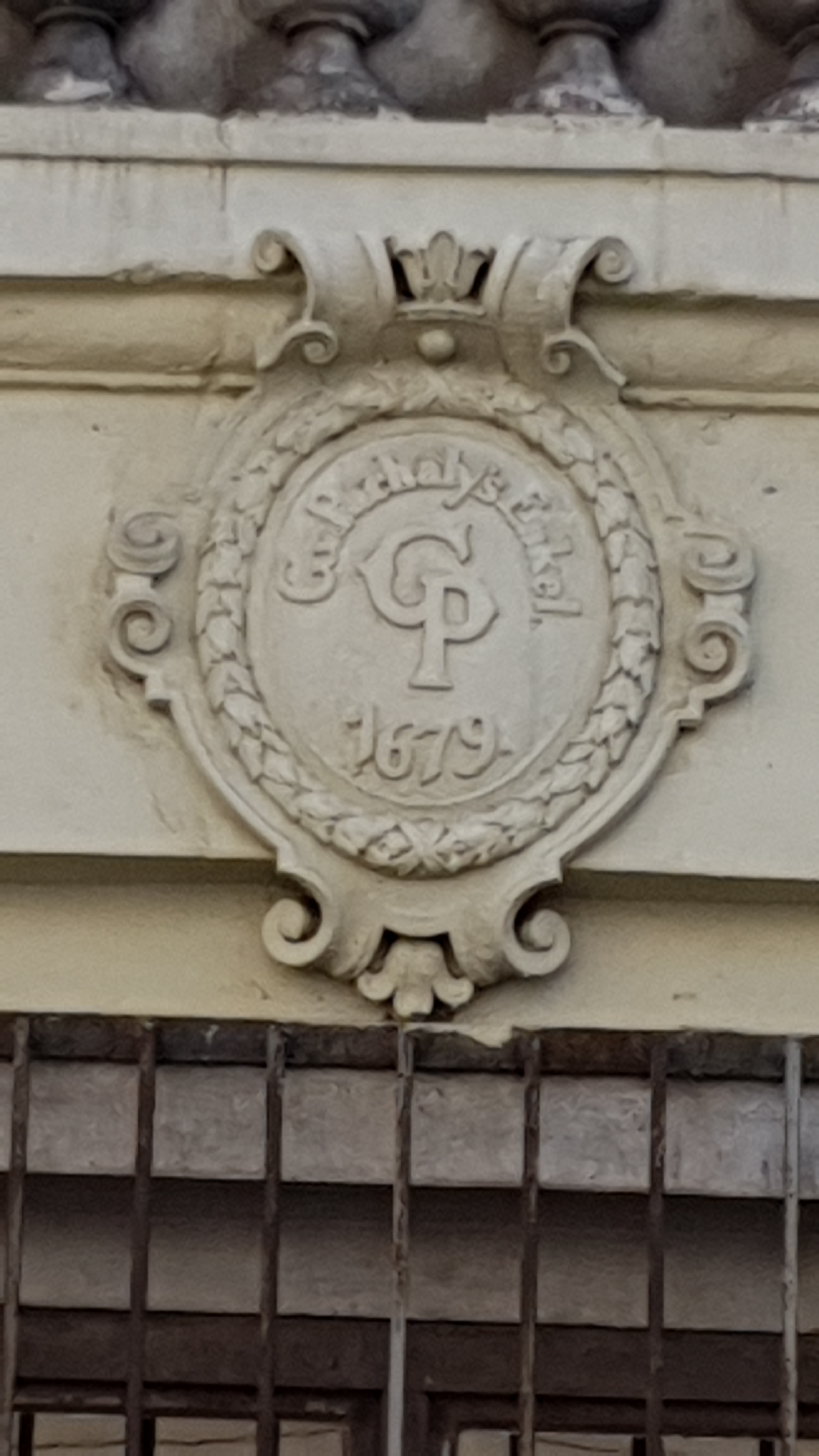 Wallenberg-Pachaly Palace in Wrocław, detal